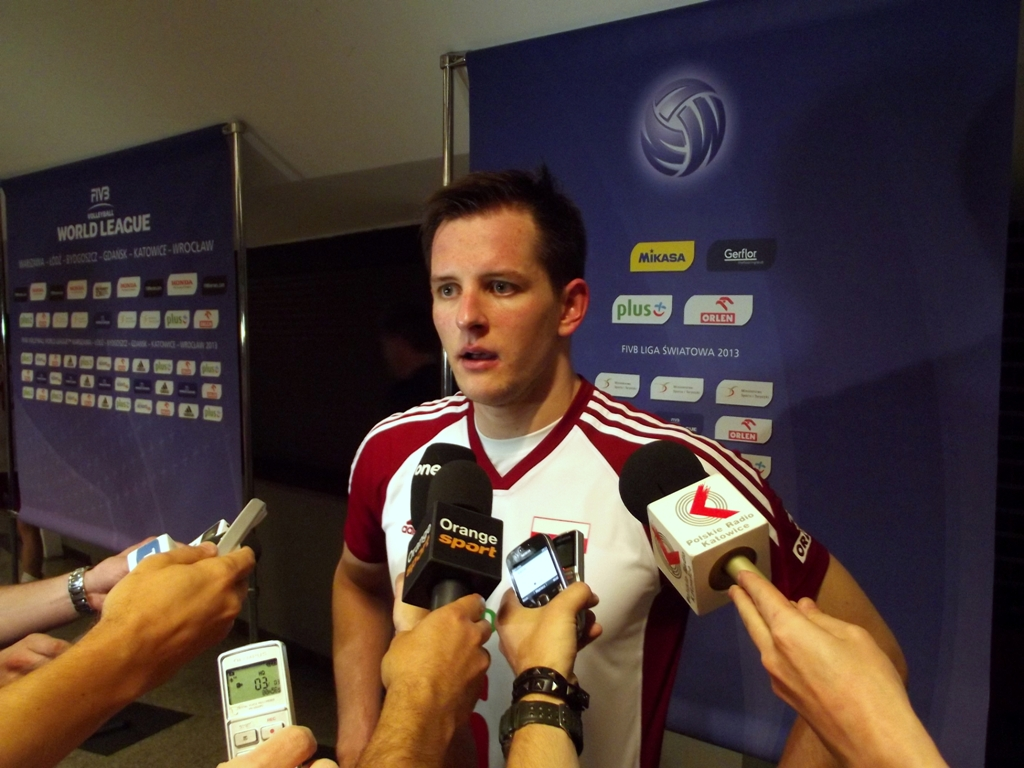 Zdjęcie zrobione podczas meczu Polska - USA siatkarskiej Ligii Światowej w katowickim Spodku.